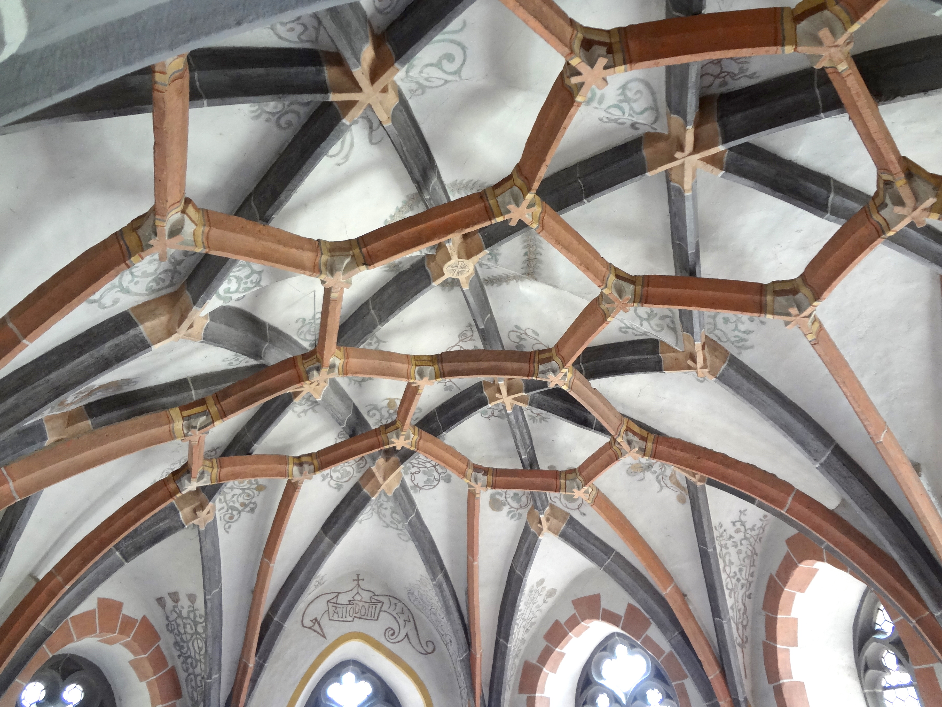 Pfarrkirche Langenstein Chorgewölbe.